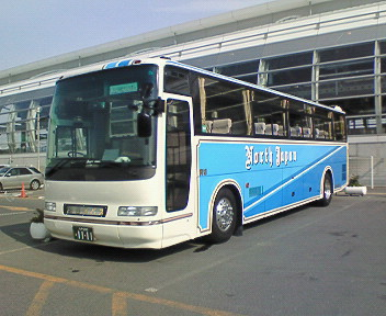 北日本中央観光バス： - 日野・セレガハイデッカー 八戸駅西口にて